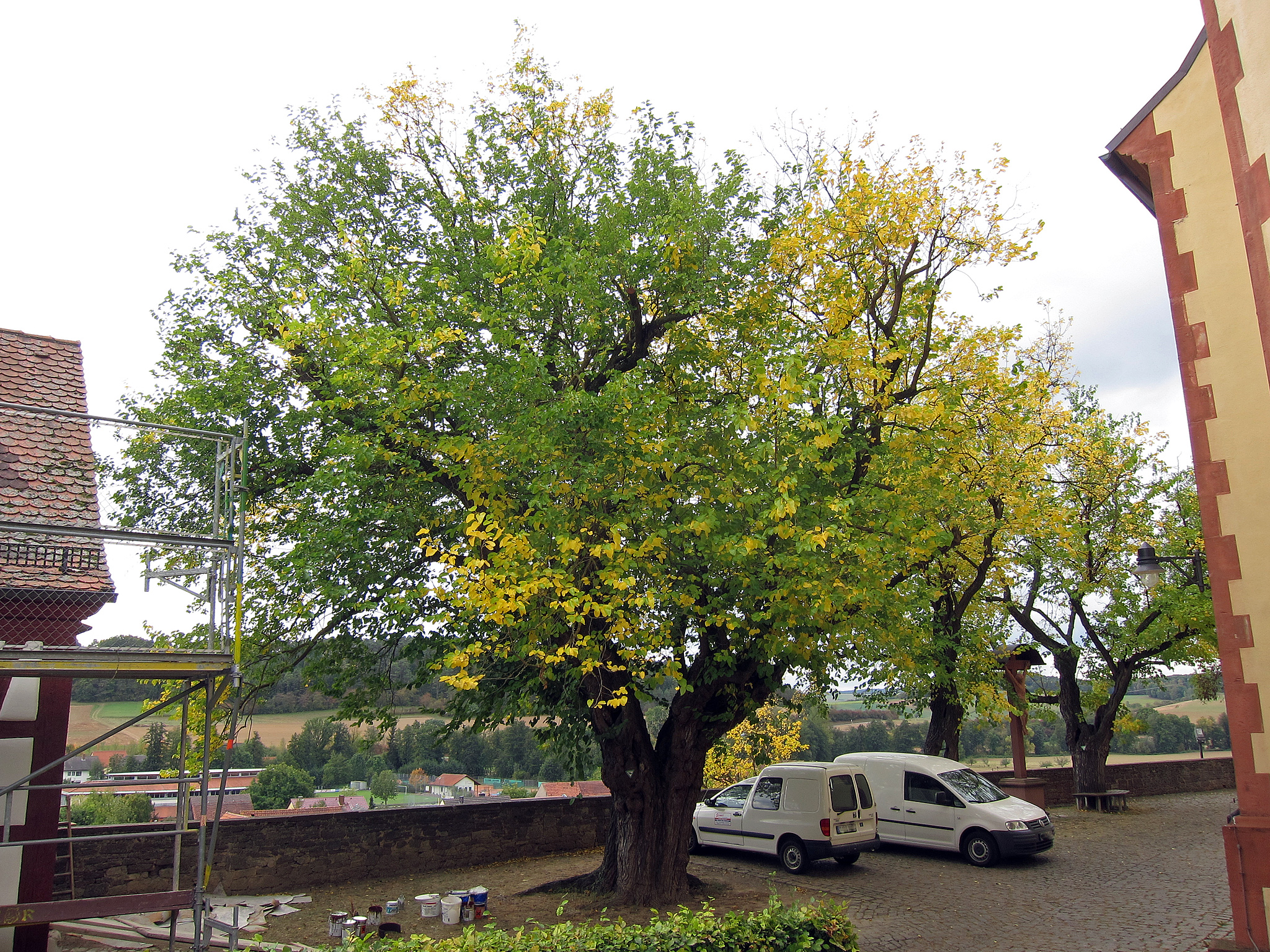 Maulbeerbaum Karbach